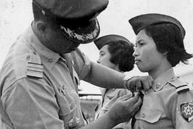 Herdini (tengah) dan Lulu Lugiyati (kanan) dilantik menjadi penerbang perempuan pertama di TNI AU oleh Komandan Wing saat itu. Hanya dua dari tiga calon penerbang perempuan yang lulus di masa itu dan selanjutnya bertugas sebagai penerbang solo dengan pesawat ringan Piper Cub. (Arsip Keluarga Herdini)